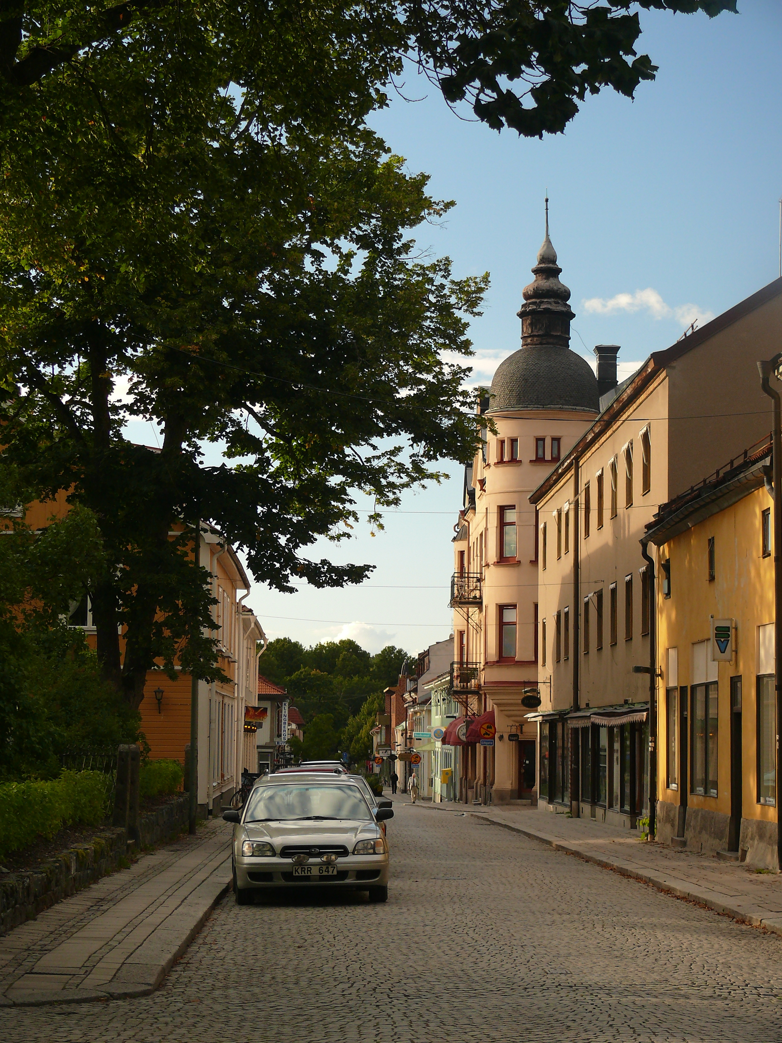 Lindesberg (Szwecja), ul. Kungsgatan.